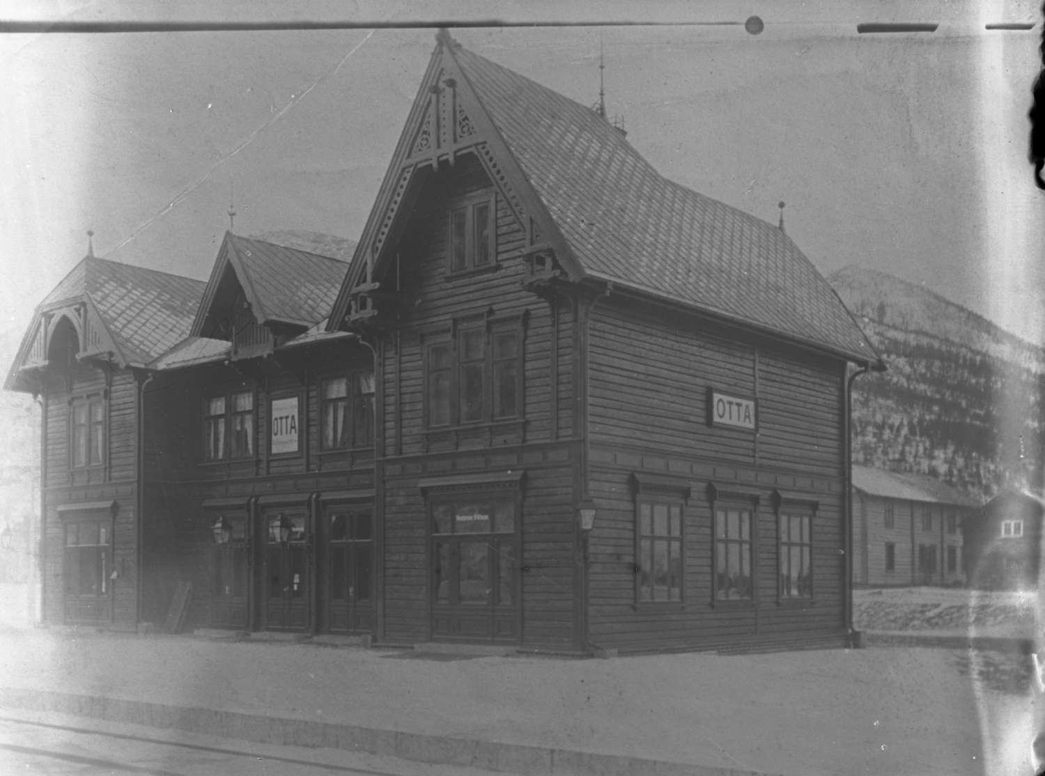 Otta stasjon (ca. 1900–1920). Foto: Severin Worm-Petersen. Fra Norsk Teknisk Museums samling i Digitalt museum.